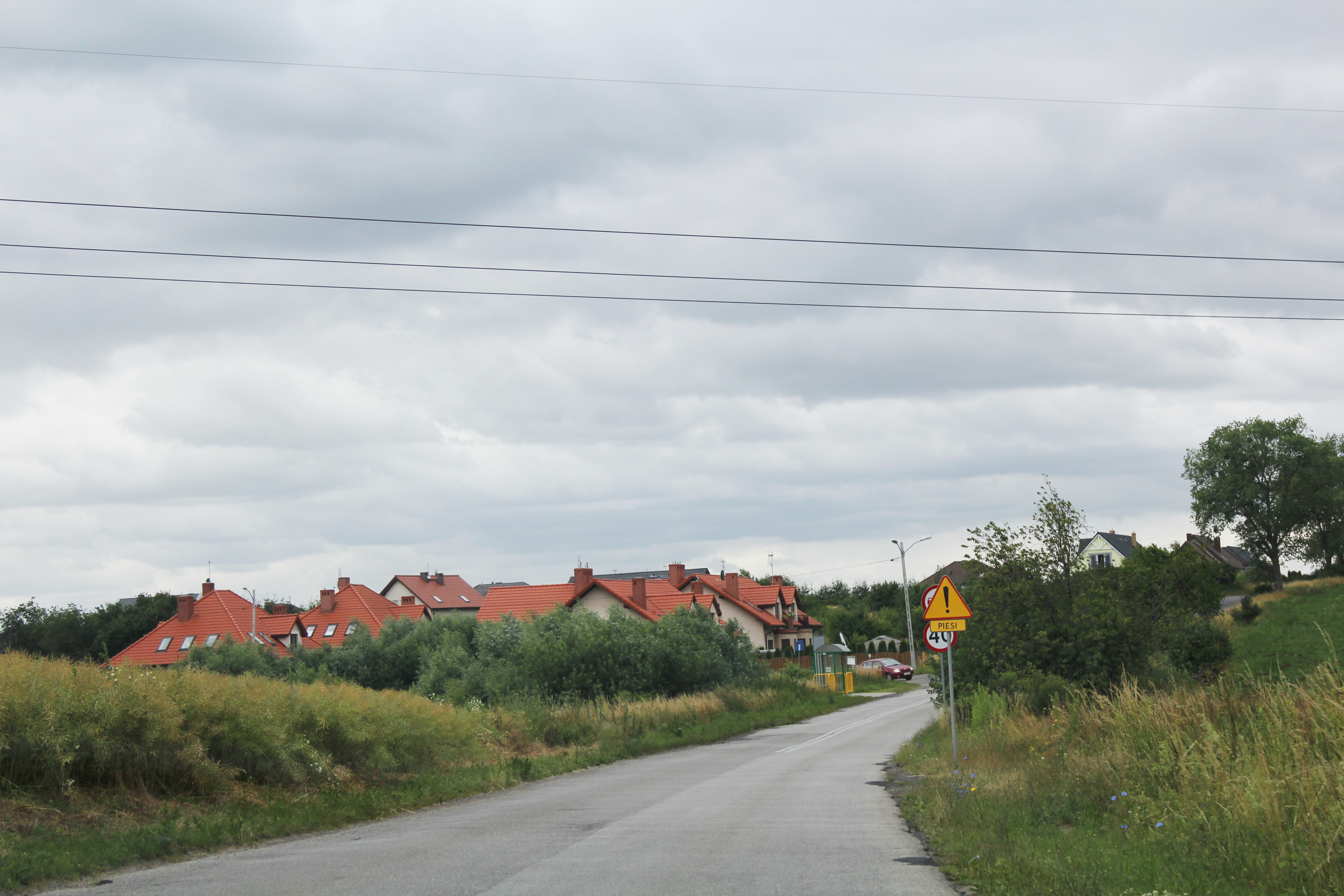 Przylep (woj. zachodniopomorskie)